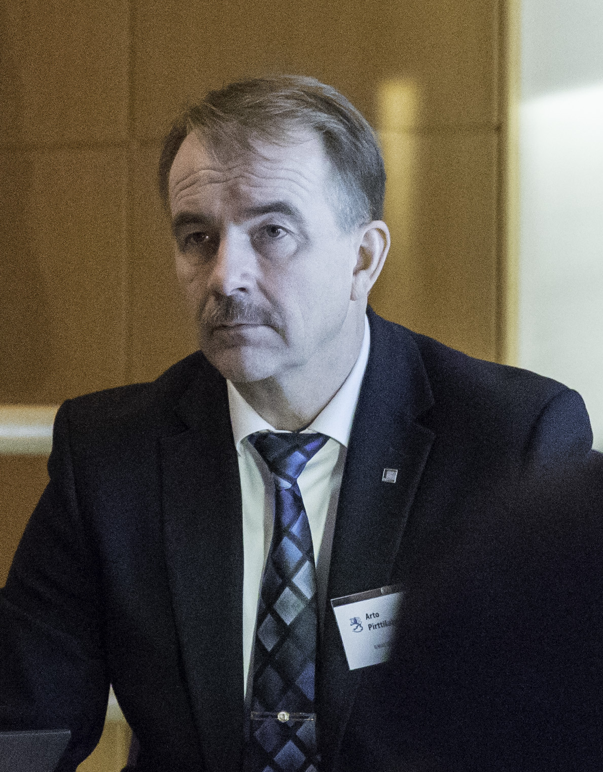 Hallitus ja hallituspuolueiden eduskuntaryhmät kokoontuivat yhteiseen ilmastokokoukseen Helsingin Vuosaareen. © Lauri Heikkinen | valtioneuvoston kanslia